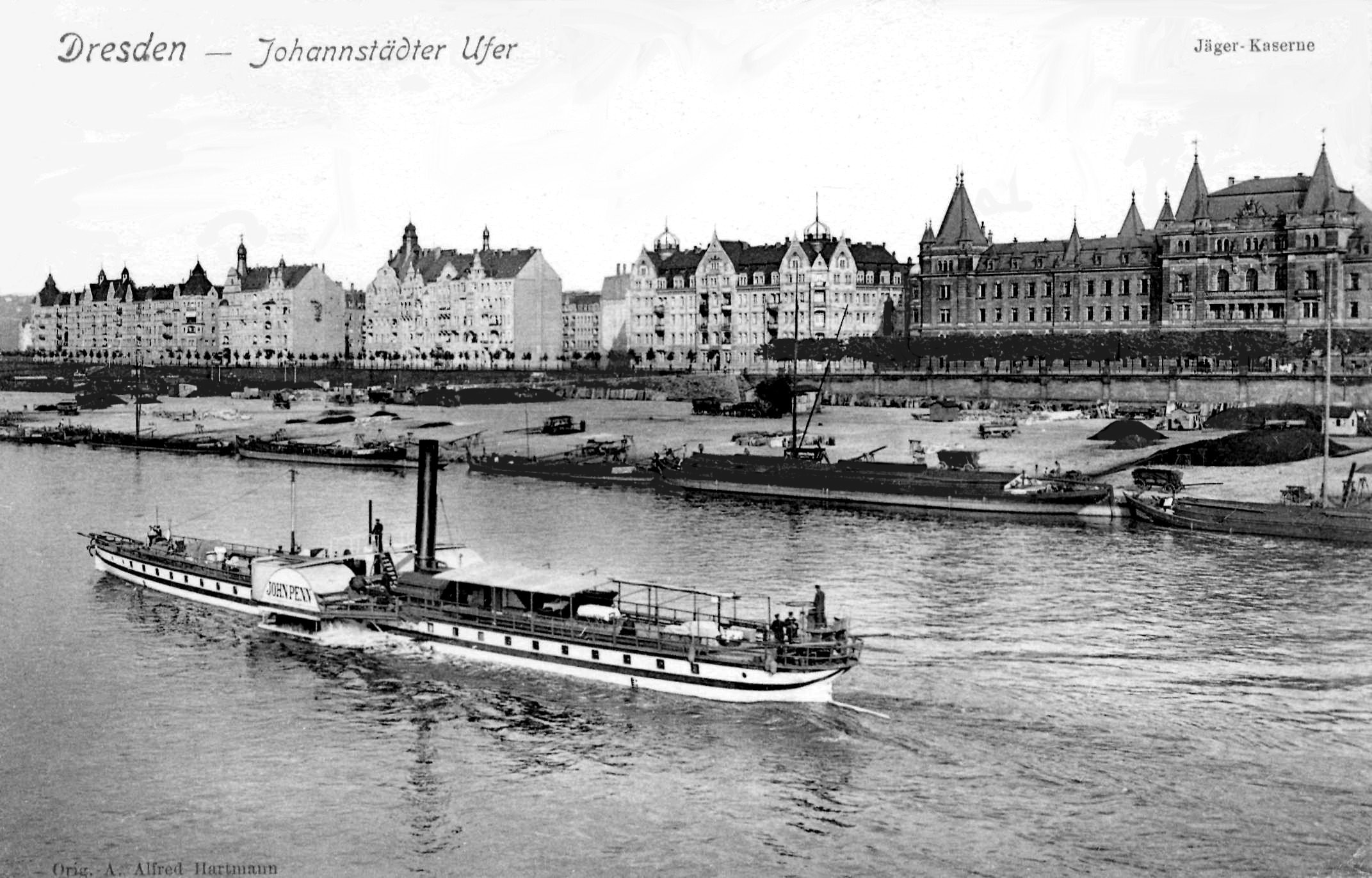 Dresden, Johannstädter Ufer mit der Jäger-Kaserne an der Elbe, von der Neustadt aus gesehen. Die Uferbebauung war geprägt von großstädtischer Bebauung im gründerzeitlichen Stil des Historismus.